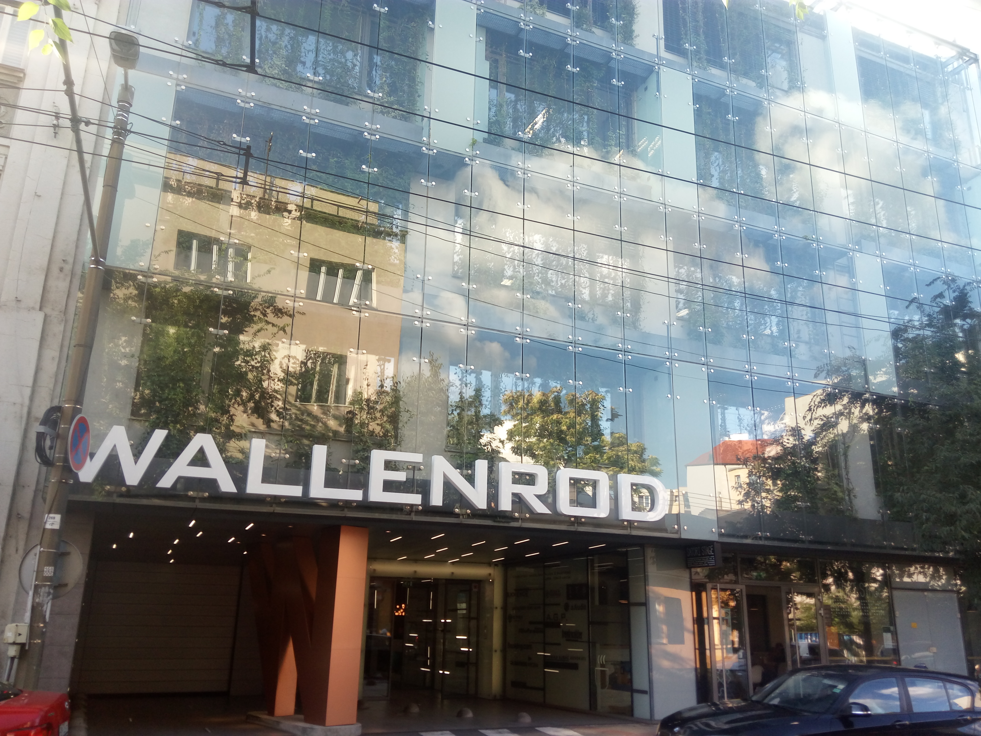 Mickiewiczova 9, Staré Mesto, Bratislava